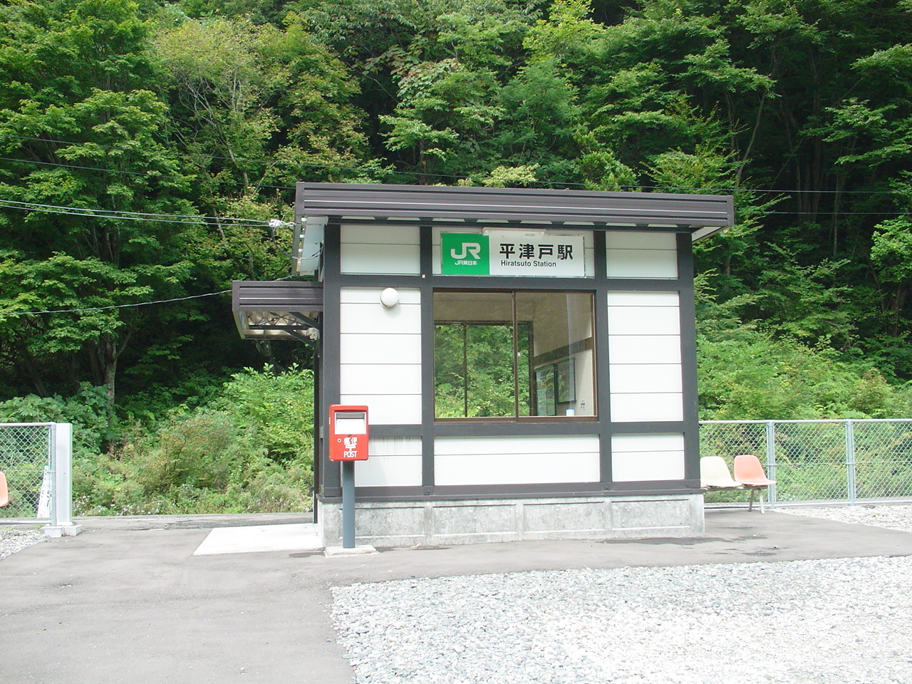 （平津戸駅）